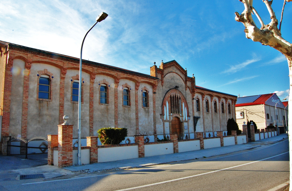 Celler Cooperativa Agrícola (Vila-rodona)